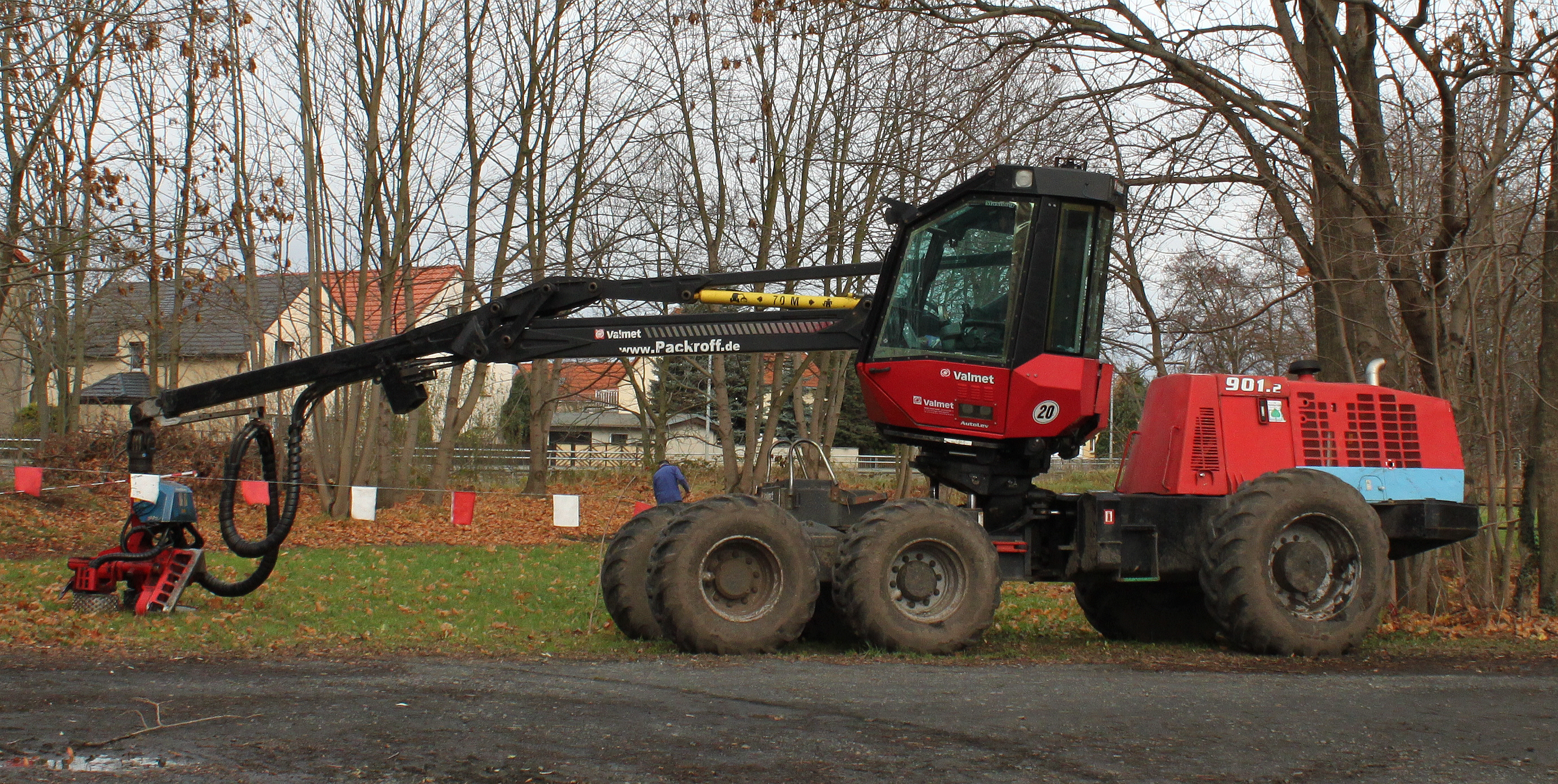 Valmet 901-2 Harvester